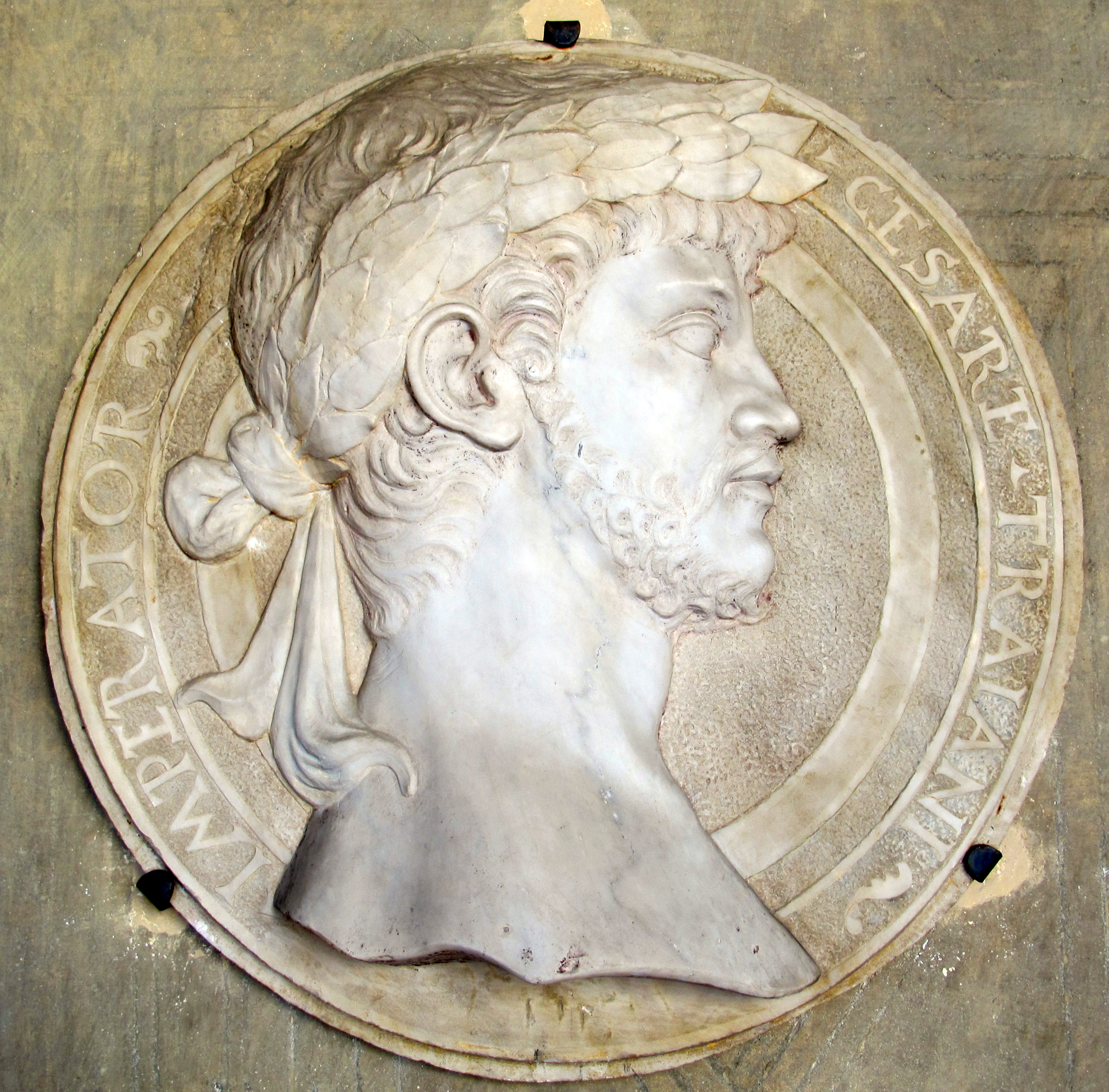 Arte toscana, medaglione con ritratto di traiano, 1554-1564 ca.